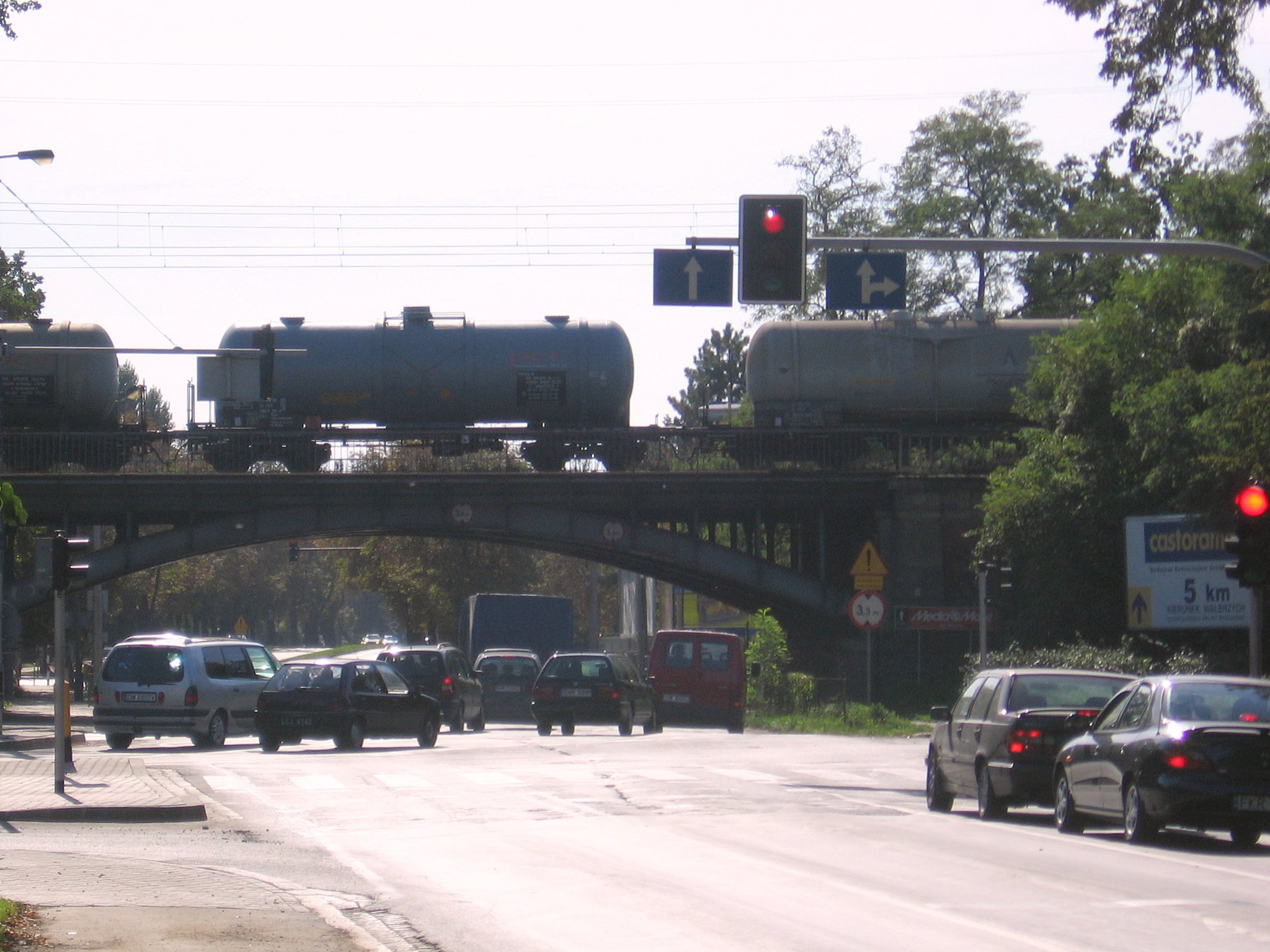 Kolejowa obwodnica towarowa we Wrocławiu, wiadukt u wylotu ulic Ślężnej (z lewej) i Sudeckiej (w miejscu wykonaniu zdjęcia i za plecami fotografującego) w kierunku Wyścigowej (za wiaduktem na wprost).